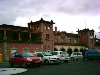 Estation in Villagarcía de Arosa (Spain)